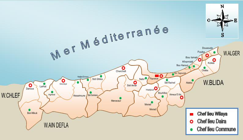 Tipasa42